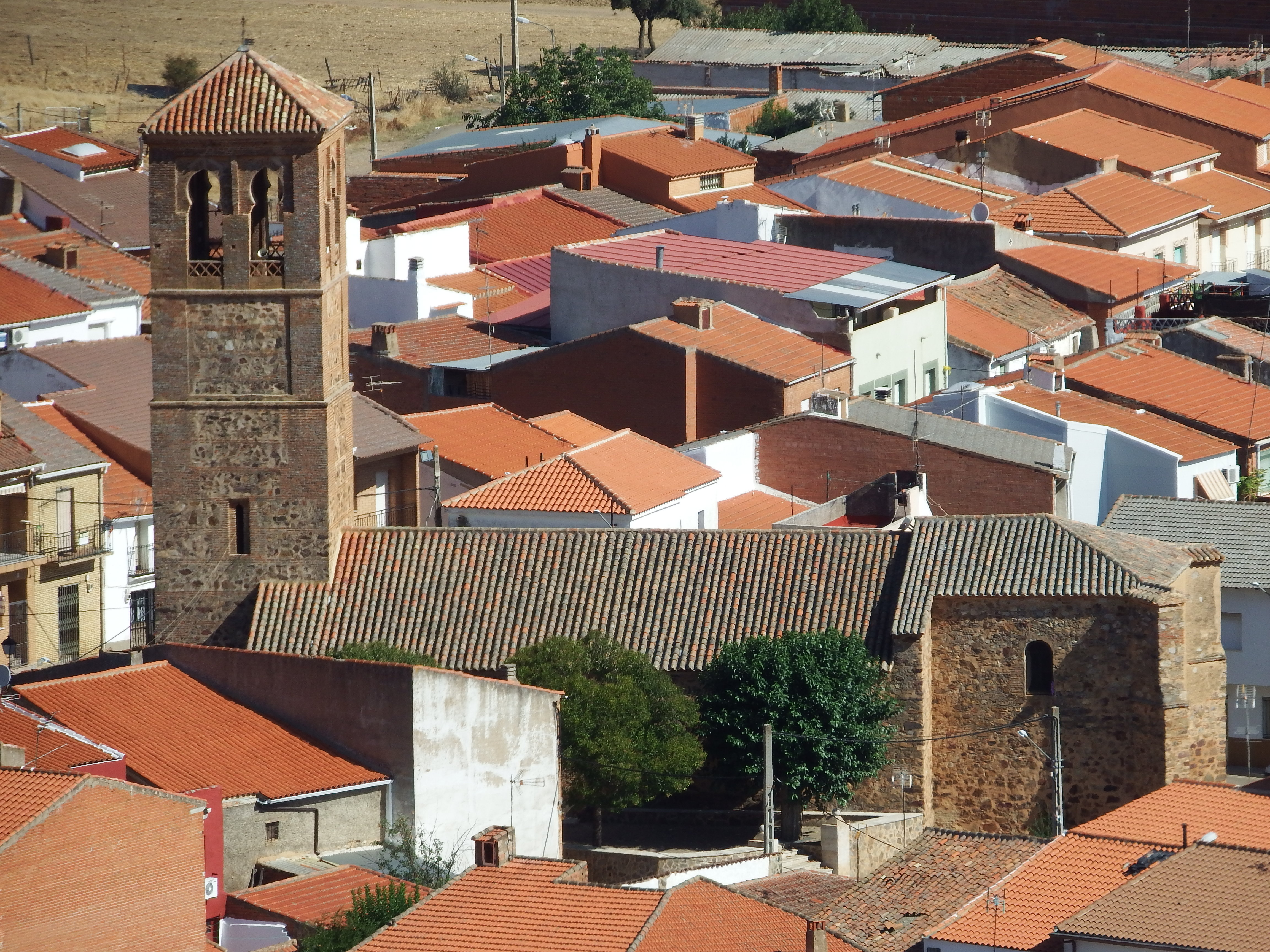 Arroba de los Montes, Ciudad Real